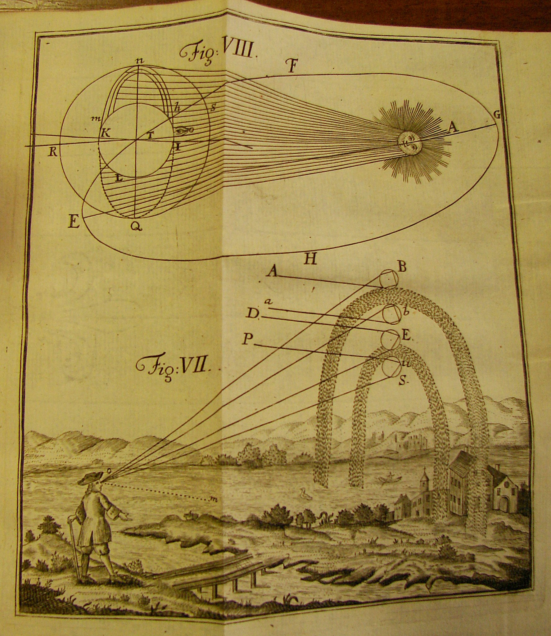 vyfoceno z díla Jana Nepomuka Polanského pojednávající o duze